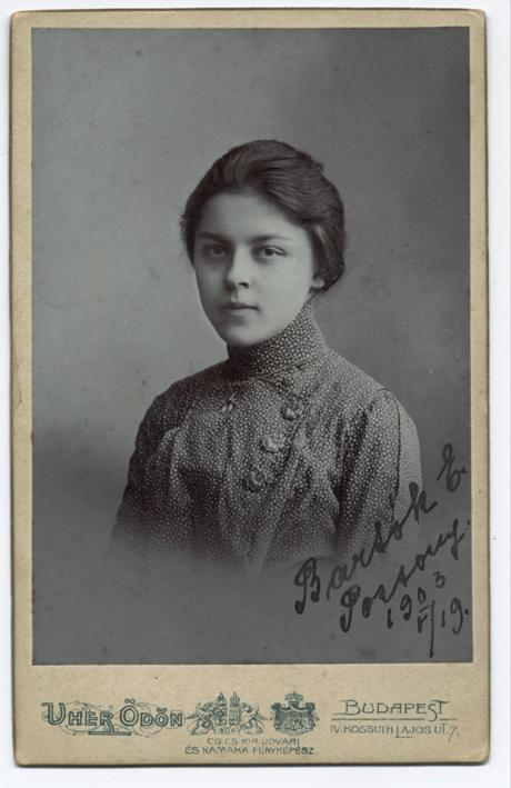 Bartók Elza (1885–1955), Bartók Béla húga.